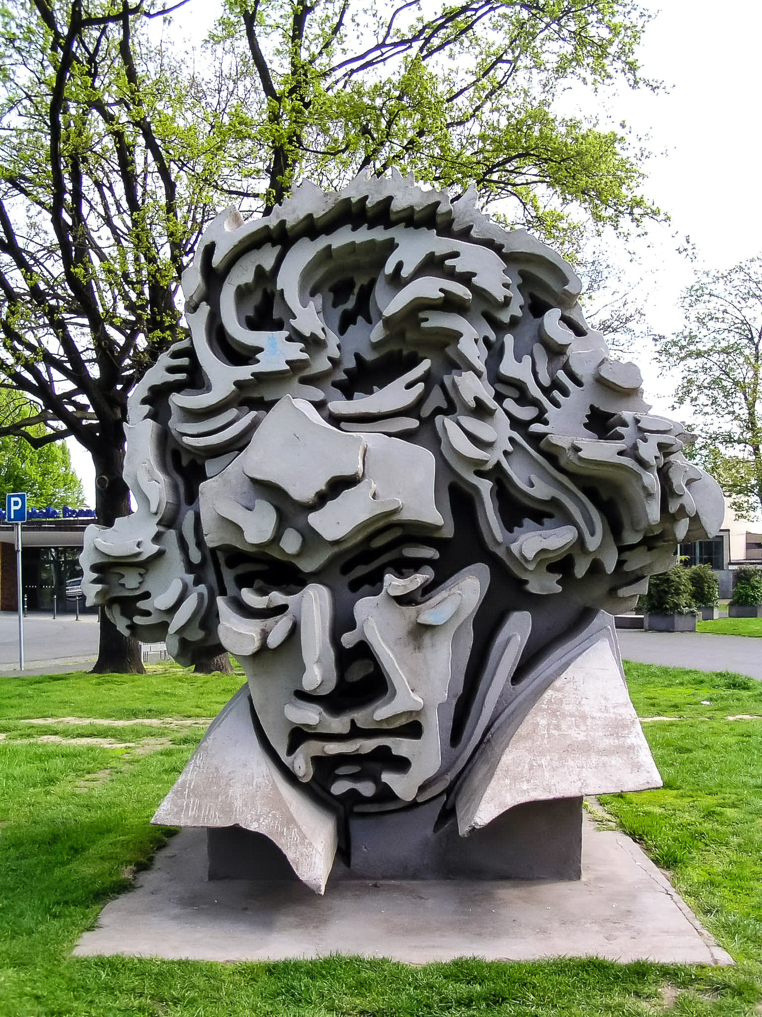 Beethon; Eine Skulptur von Klaus Kammerichs, nach der Vorlage des Beethoven-Porträts von Joseph Karl Stieler.